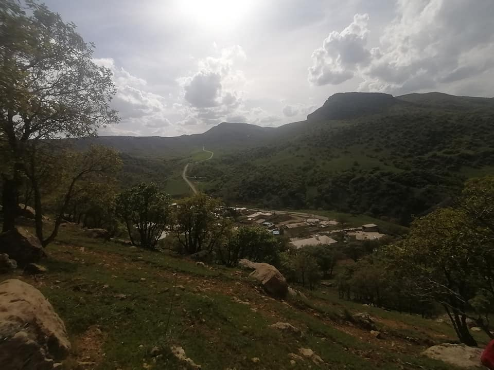 کوردی: دیمەنی گوندی بەردەکەڕ